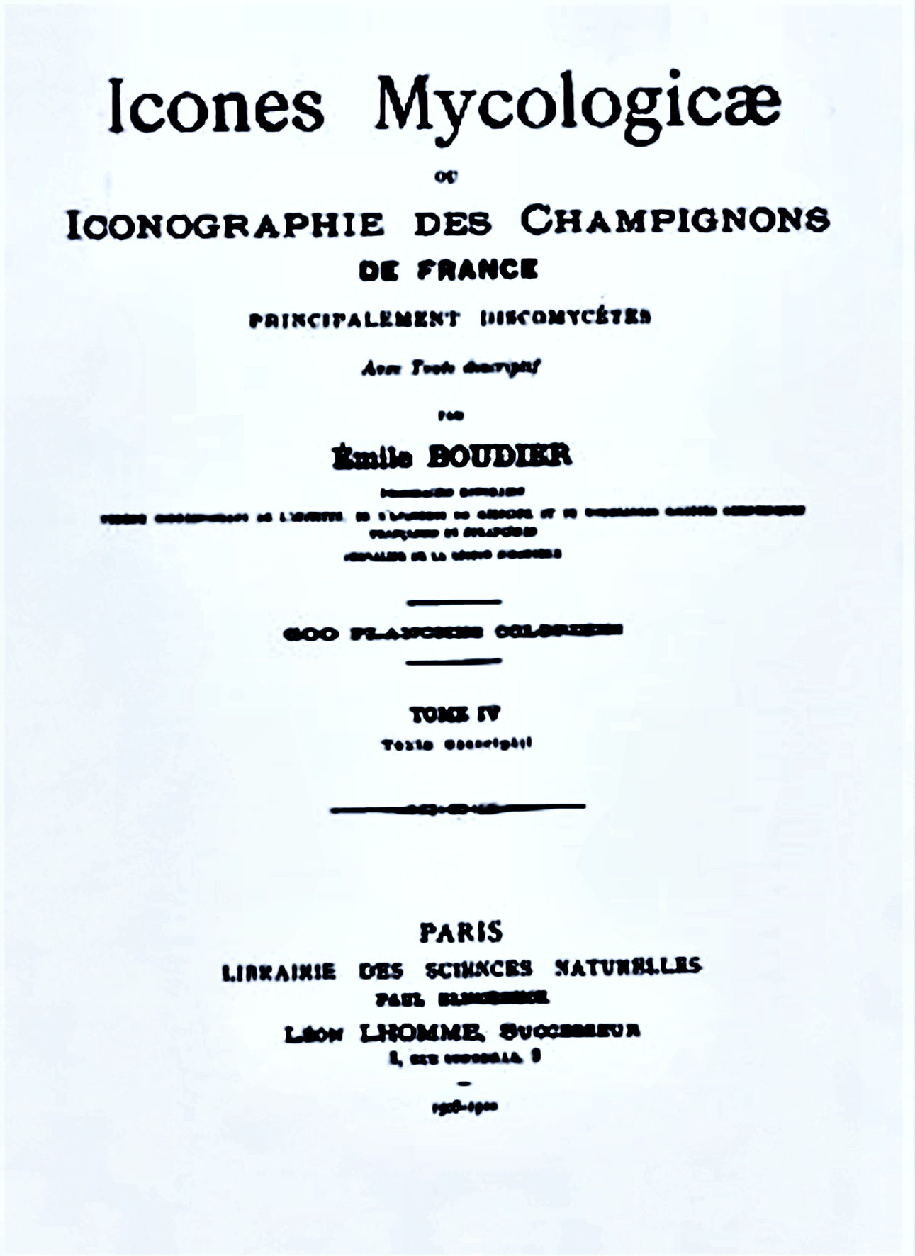 Émile Boudier: Icones Mycologicae , vol. 4, Editura Paul Klincksieck,.Paris 1908